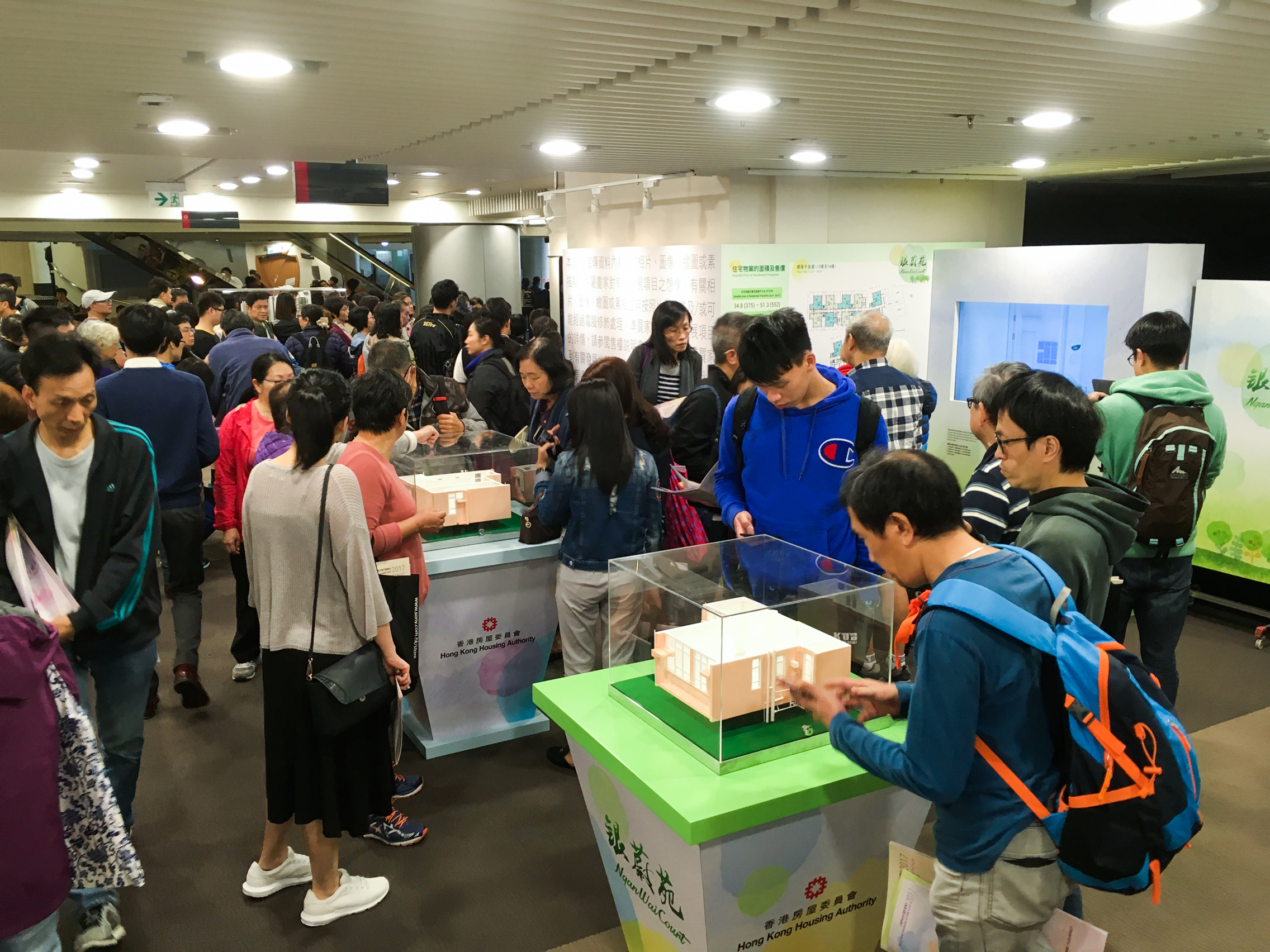 HOS 2017 showroom